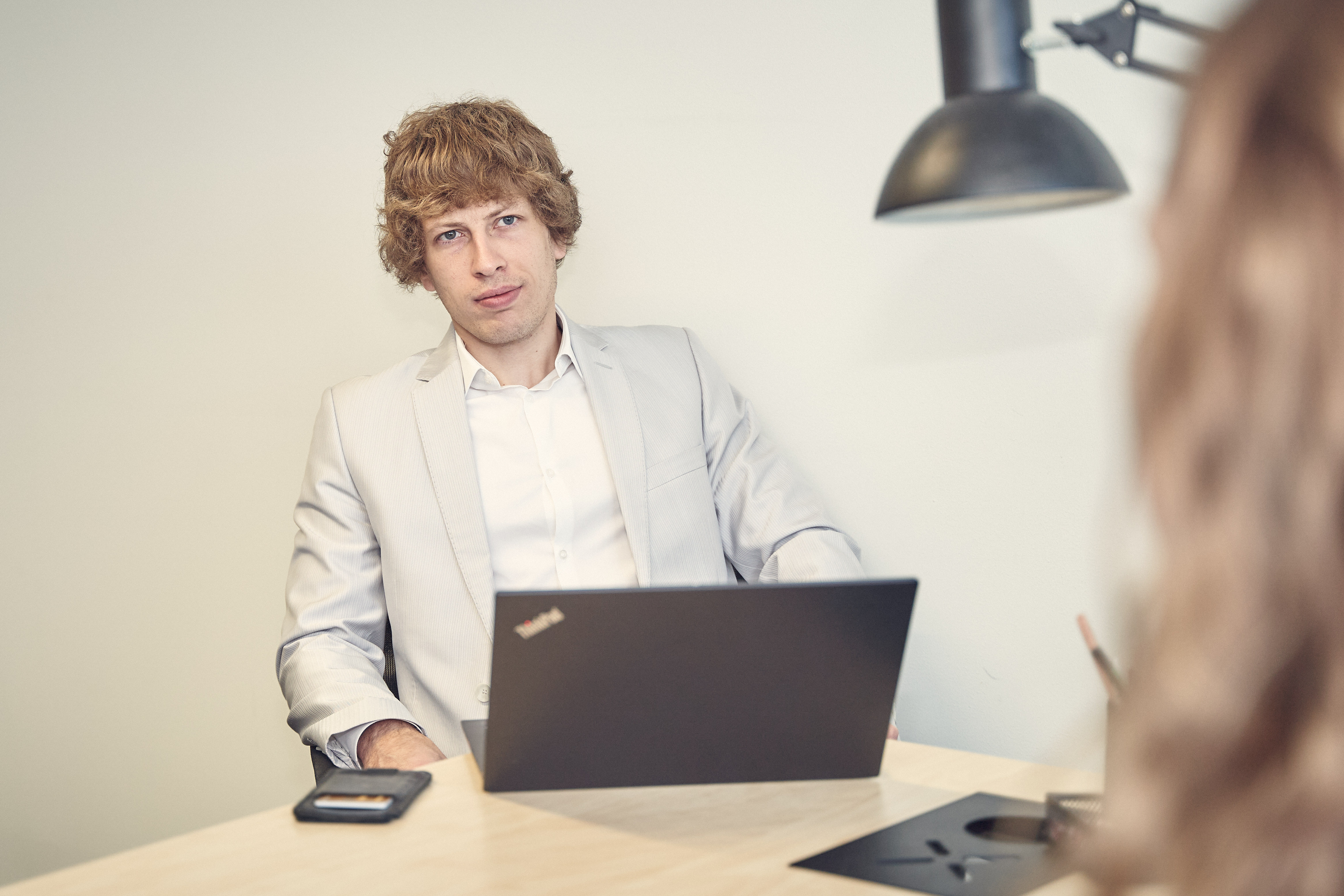 Tanel Kiik 2020. aasta juulis Terviseametis